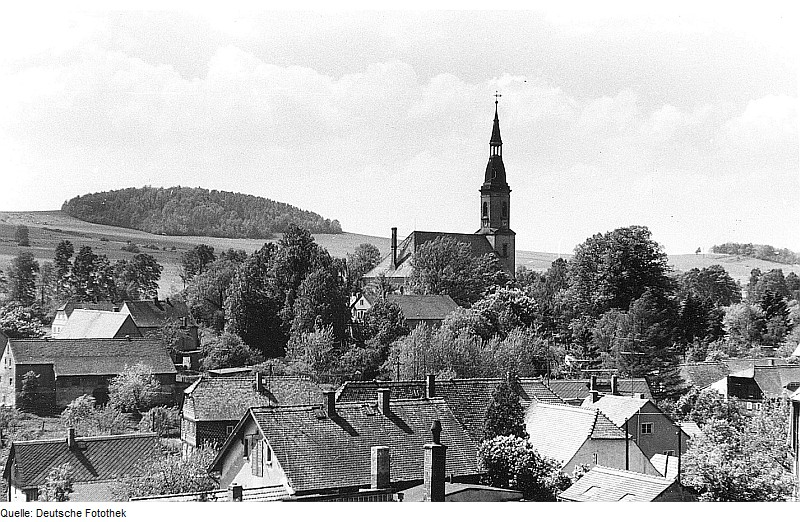 Original image description from the Deutsche Fotothek Oderwitz-Oberoderwitz. Blick von der Berndtmühle zur Kirche